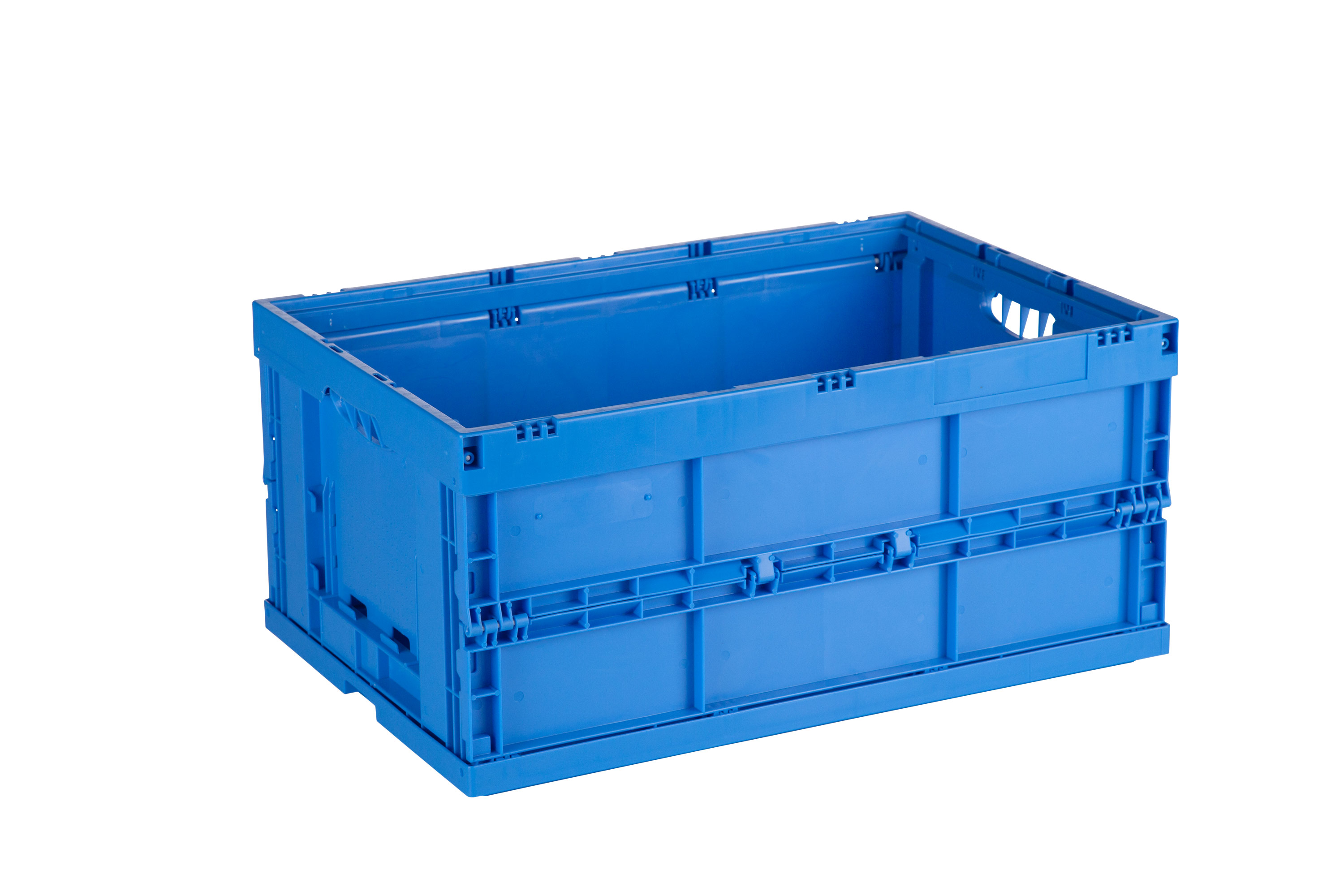 Faltbehälter im aufgerichteten Zustand.